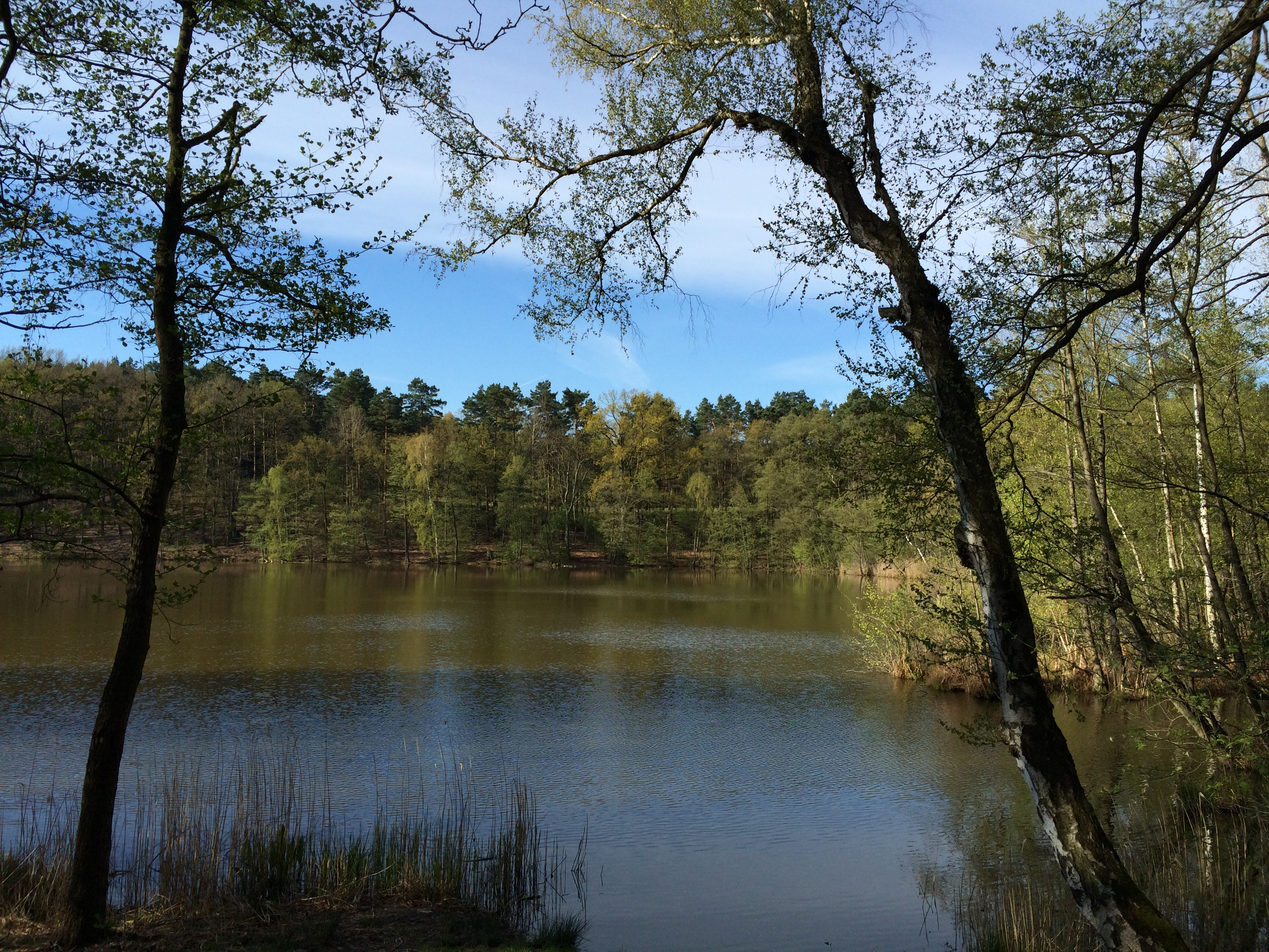 Die Heideseen bilden eine Seenplatte südlich des Ortsteils Köthen in Märkisch Buchholz, Brandenburg